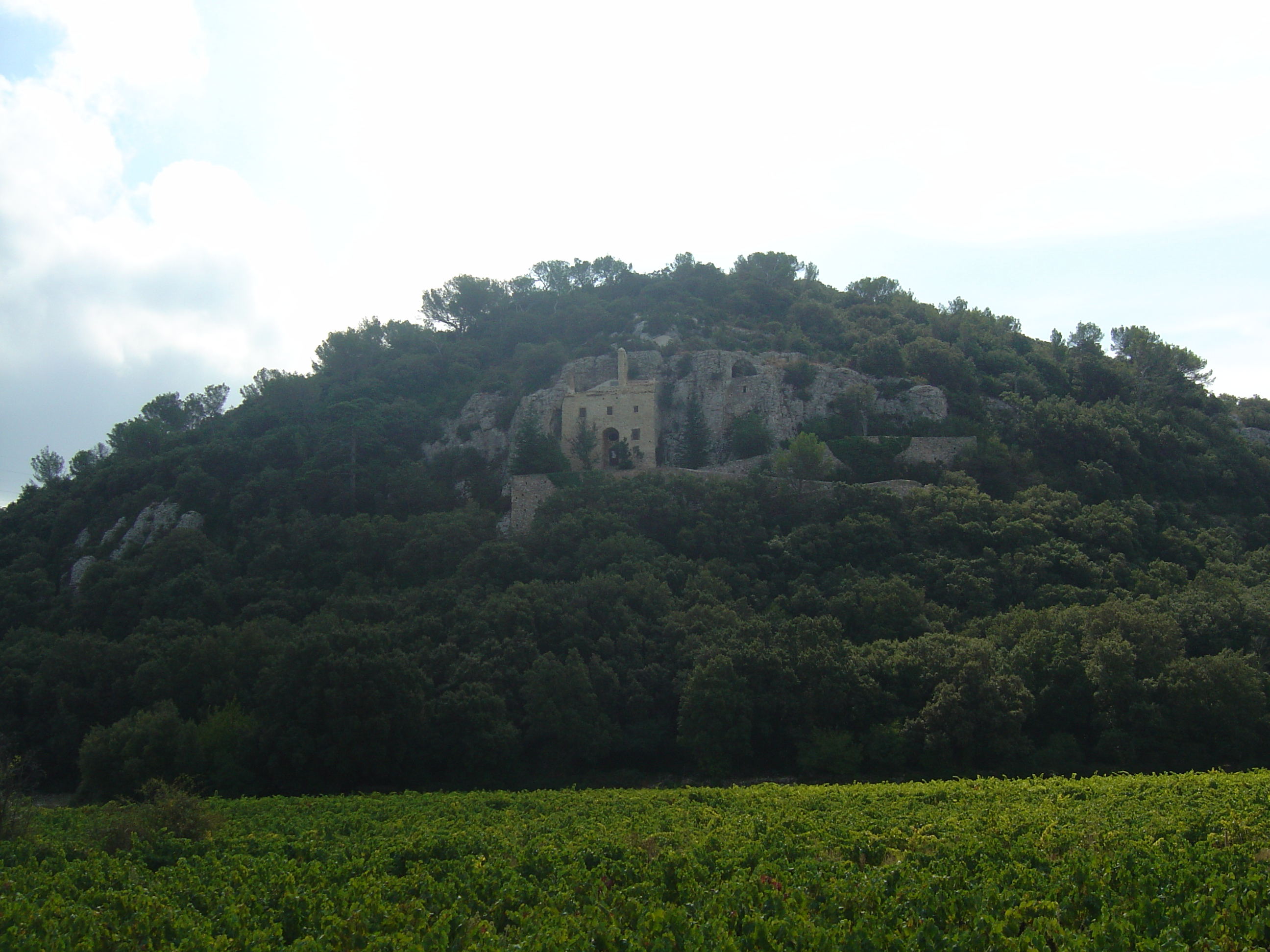 Grotte de la Sainte-Baume à l'entrée du bois de Lirac (Gard)